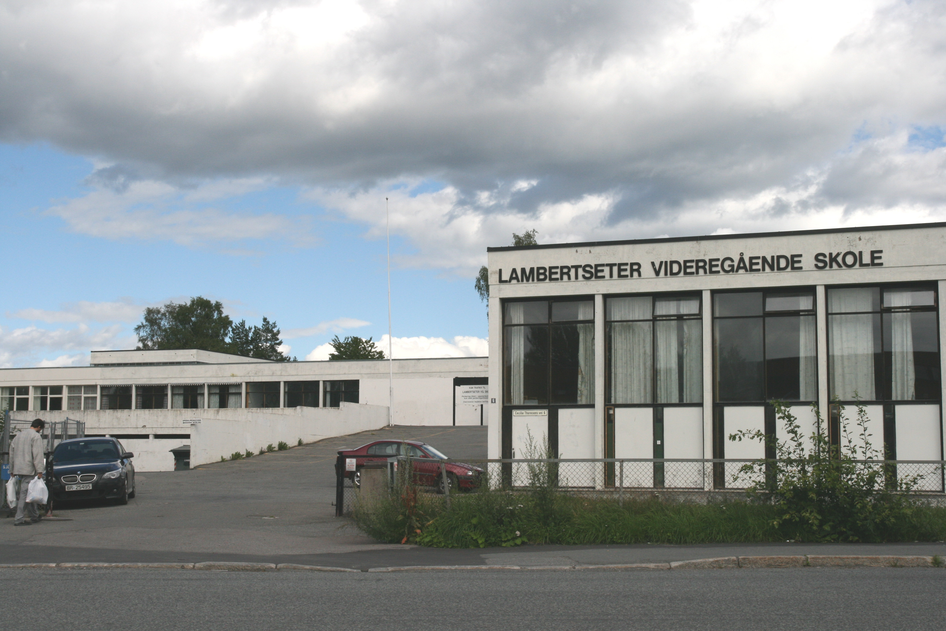 Lambertseter vgs, Oslo